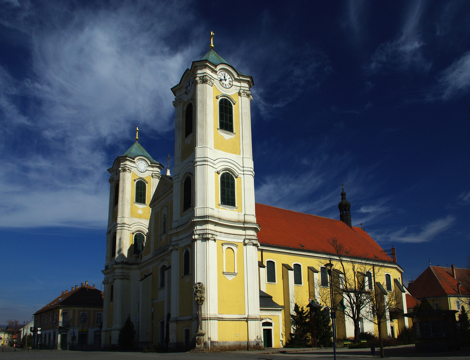 R. k. templom (Szent Bertalan) (Gyöngyös, Hanisz Imre tér)